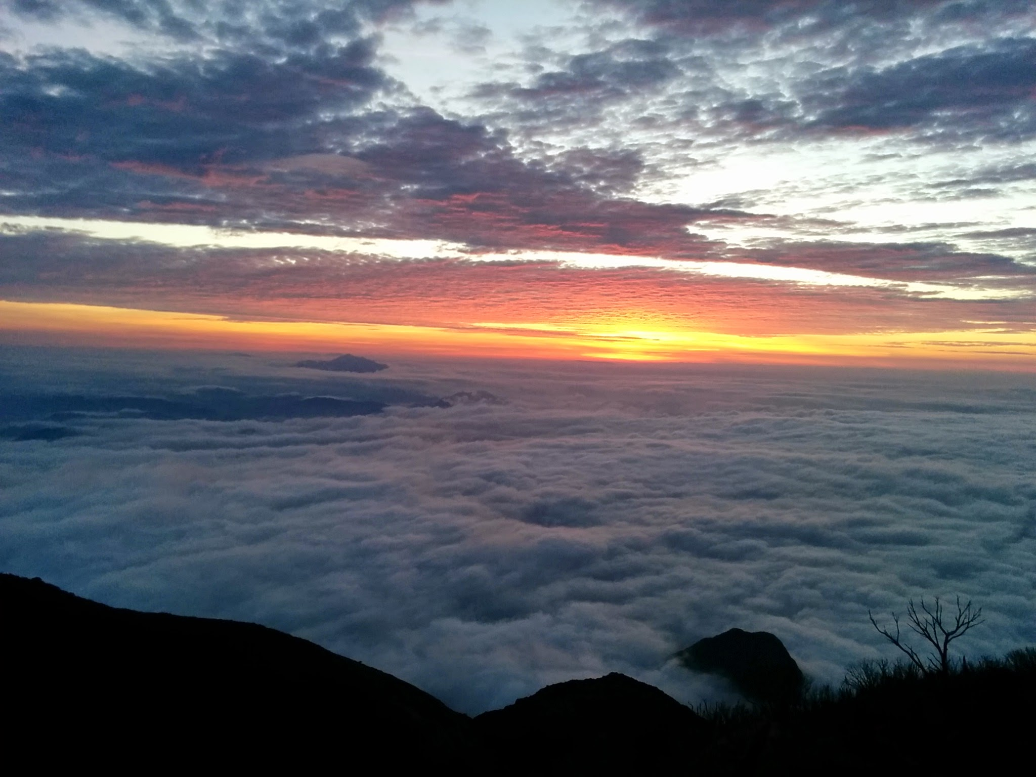 Nascer do sol visto através da montanha mais alta do sul do Brasil